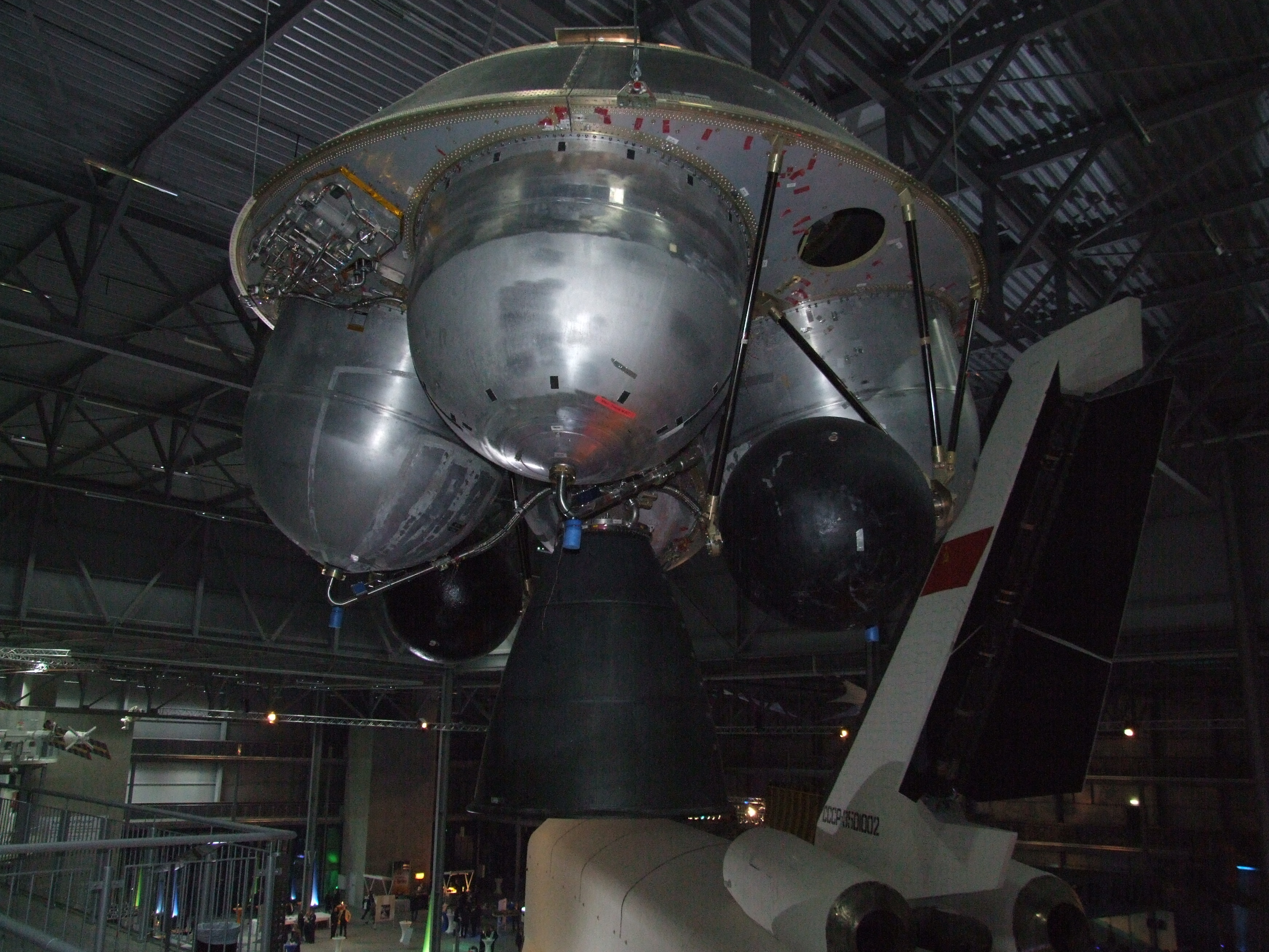 Ariane EPS 5 Oberstufe, Technik Museum Speyer